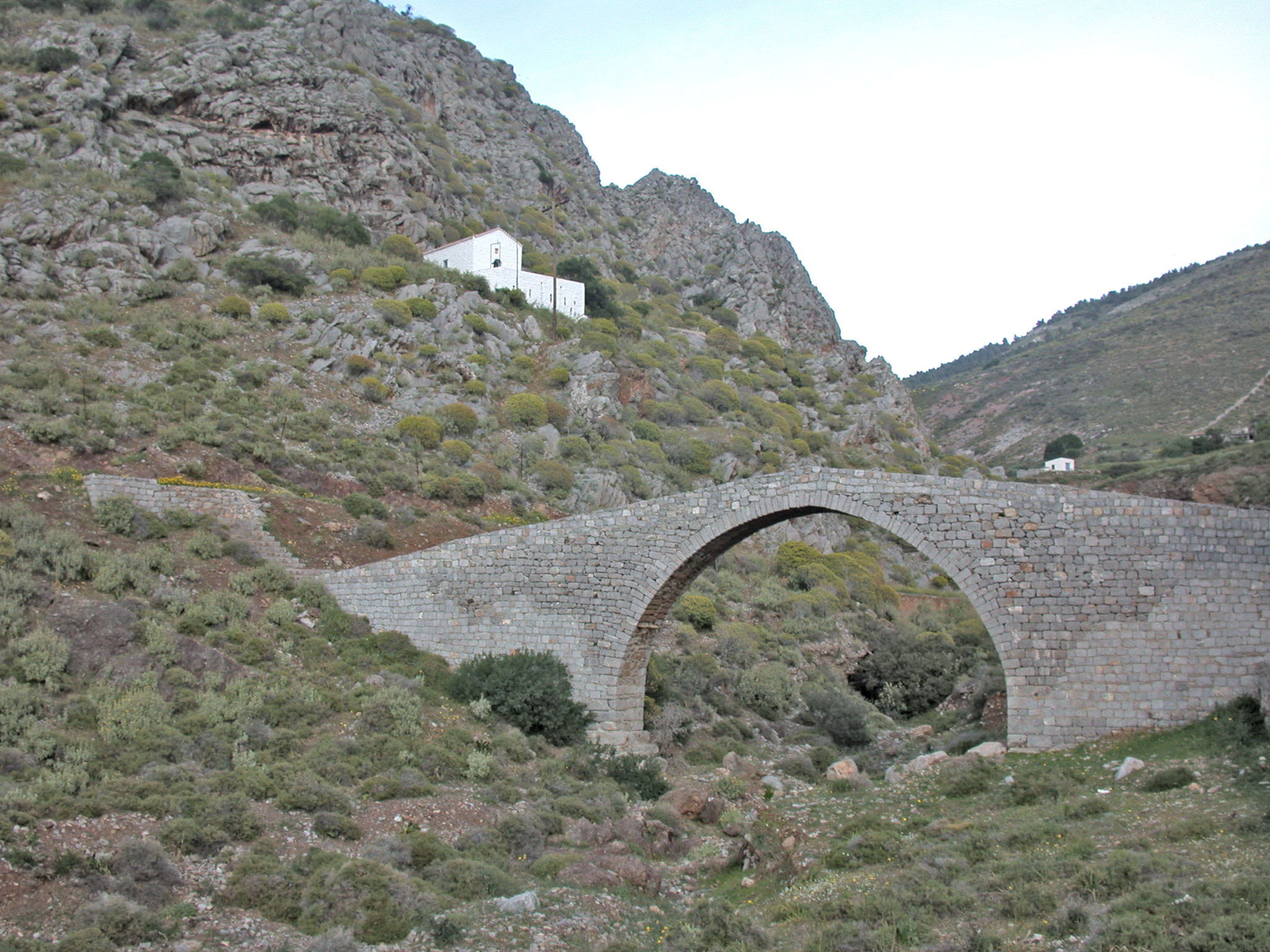 Grecia, isola di Idra, ponte in pietra presso la spiaggia di Palamidas, presso la cittadina di Idra.